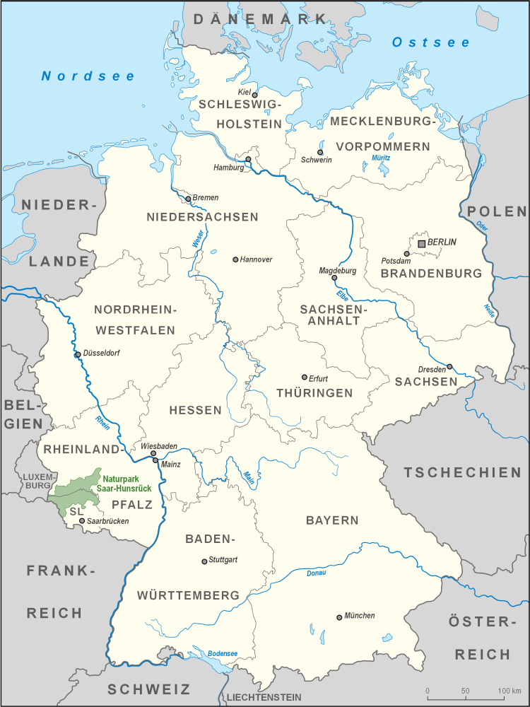 Karte des Naturparks Saar-Hunsrück in Deutschland